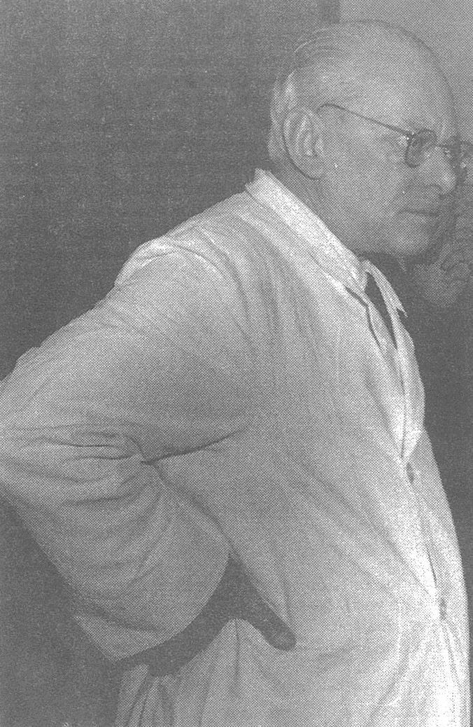 Il professor Pier Luigi Della Torre negli anni 50 all'Ospedale di Treviglio